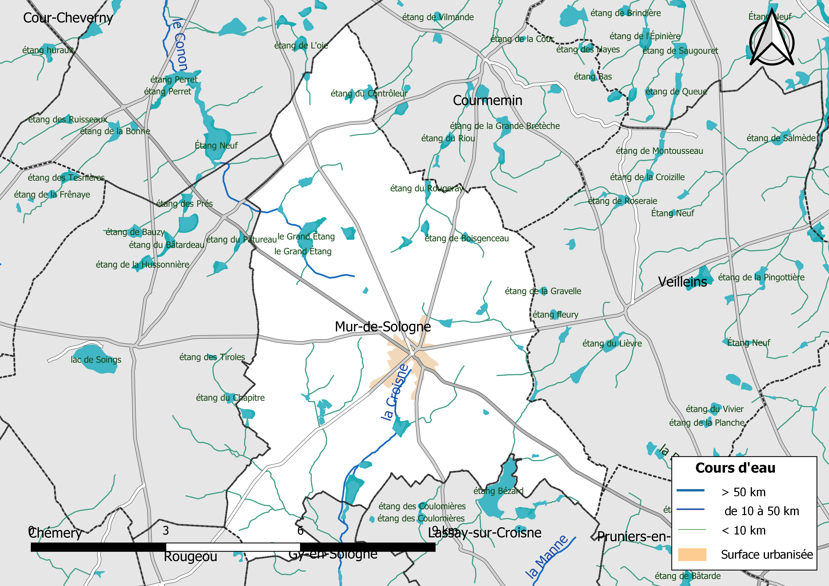 Carte du réseau hydrographique de la commune de Mur-de-Sologne (Loir-et-Cher, France).